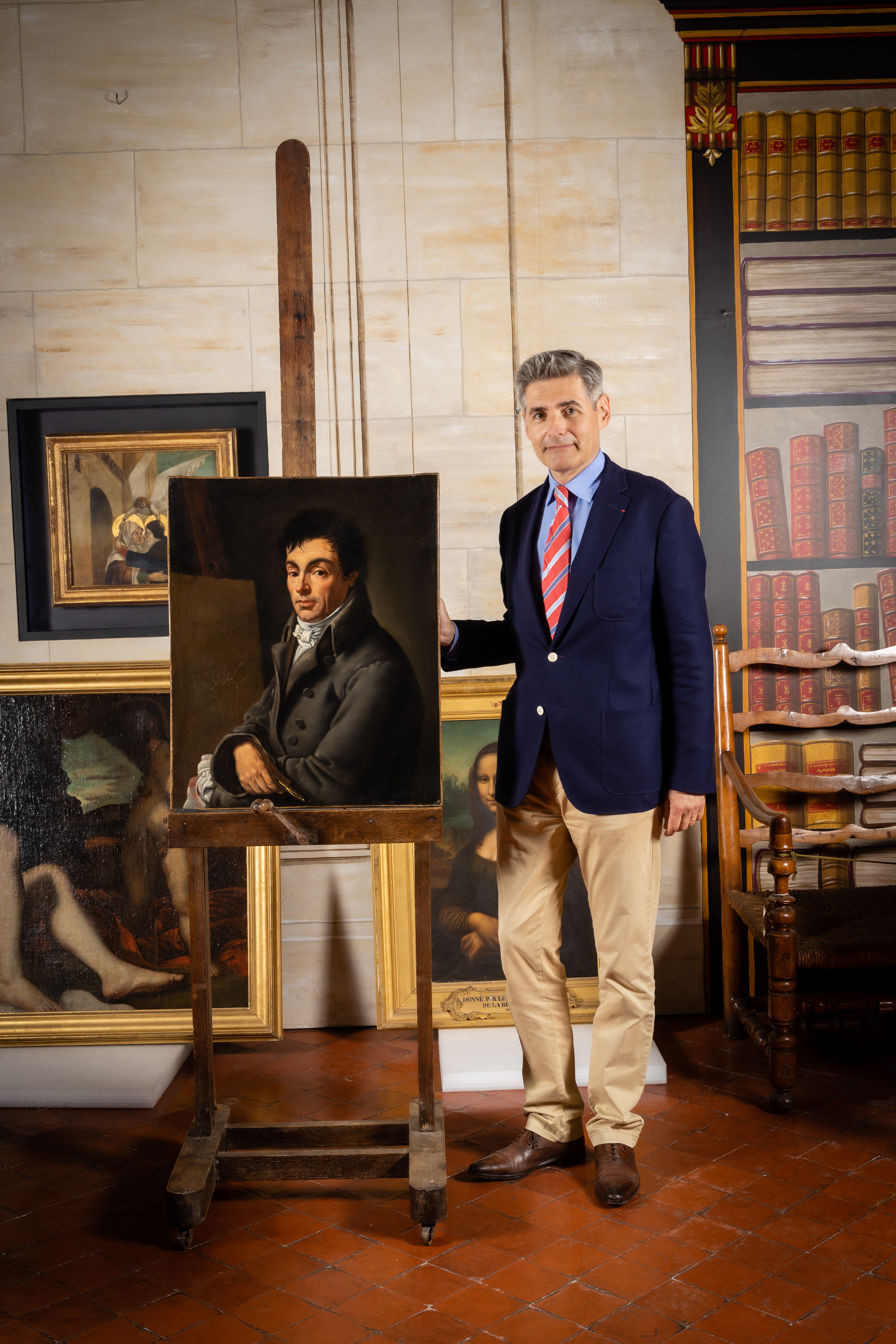 Jean-François Delmas, conservateur général, directeur de la bibliothèque-musée Inguimbertine, présente un tableau du début du XIXe siècle, nouvellement acquis, en juin 2019.